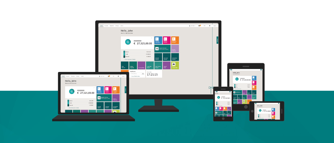 DNB responsiivse disainiga internetipank on täisfunktsionaalsuses kasutatav nii suurel kui ka väiksel ekraanil